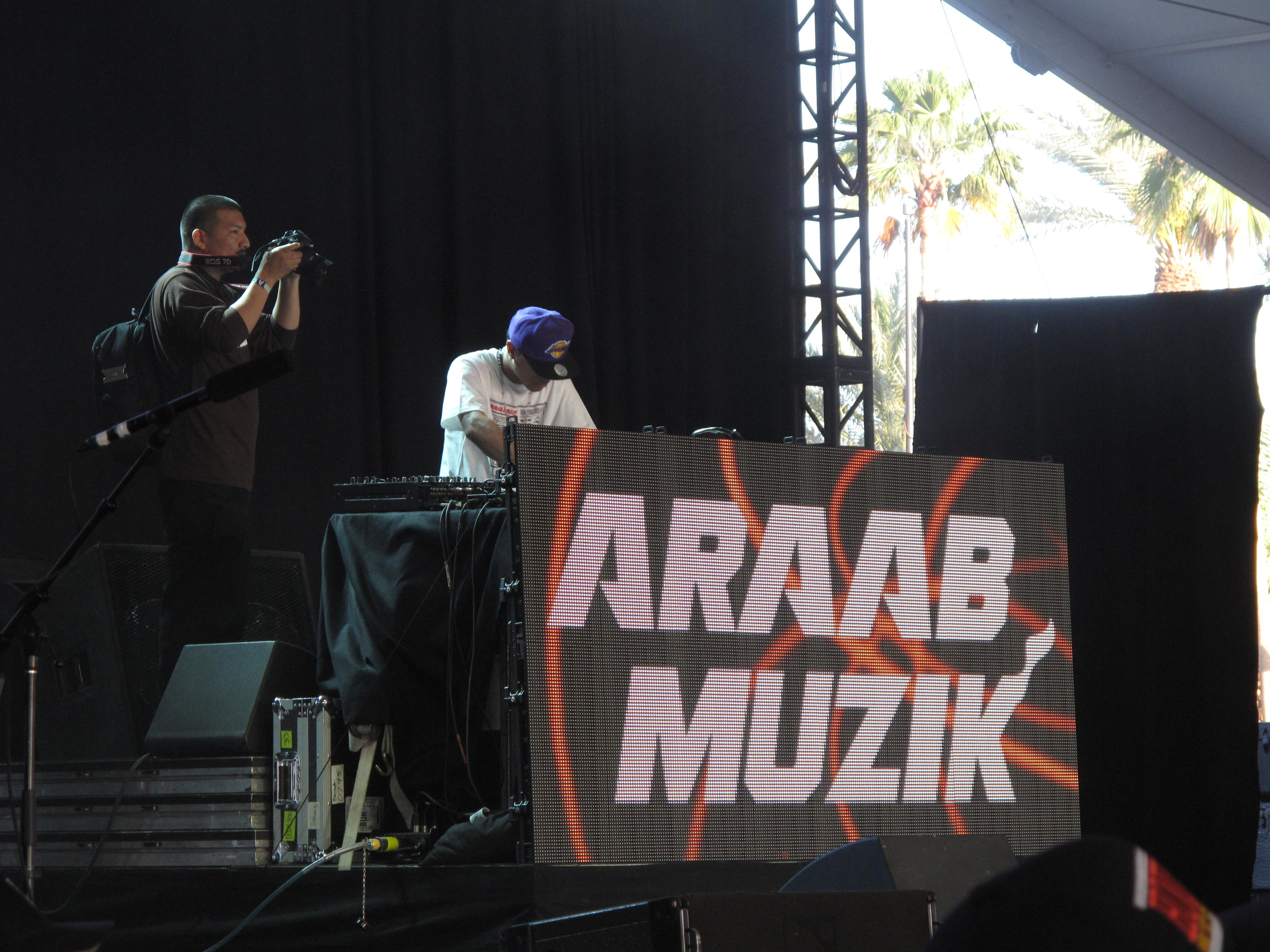 araab